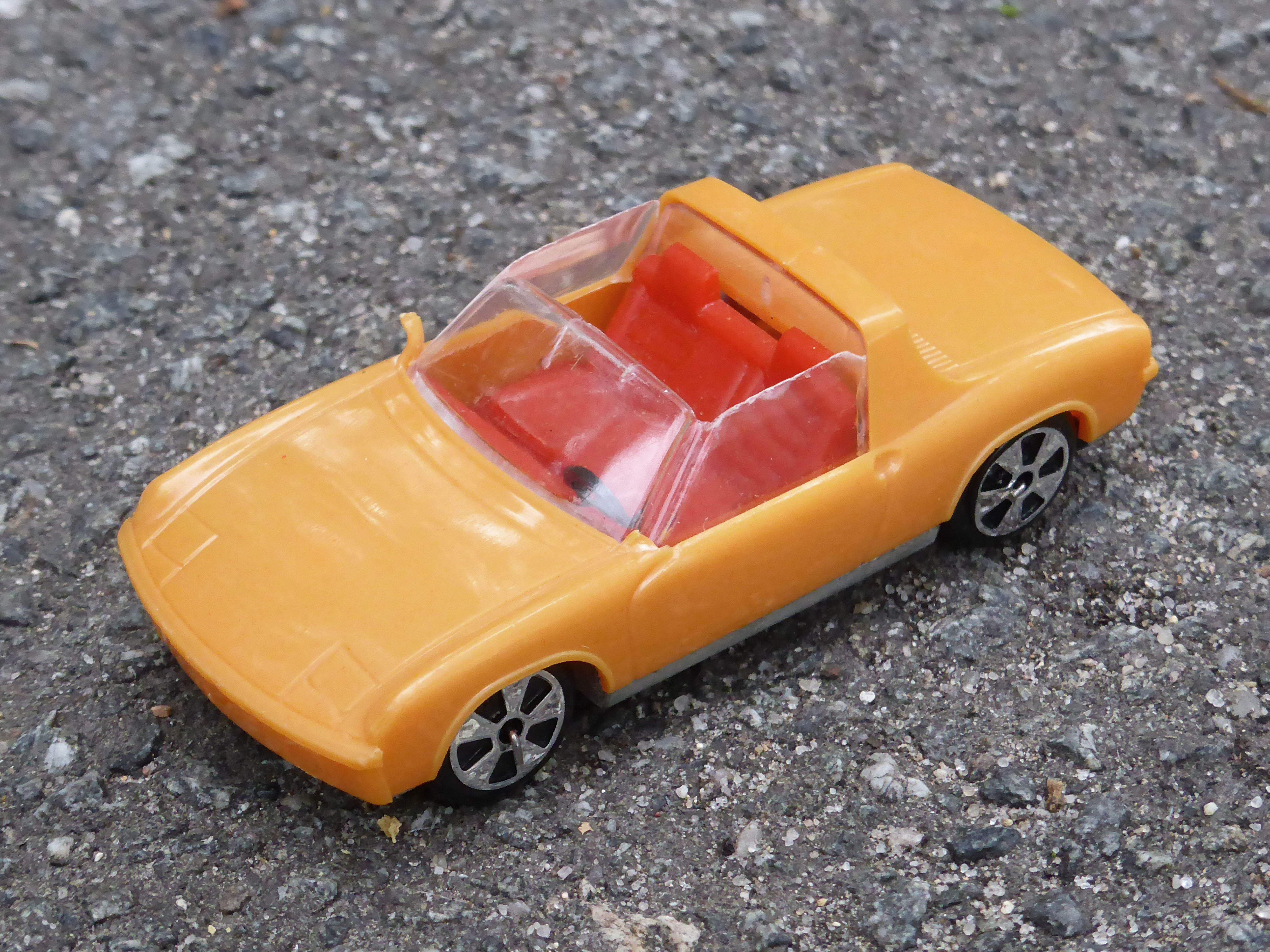 Modellauto HIT-car "VW Porsche 914/6" von Faller.